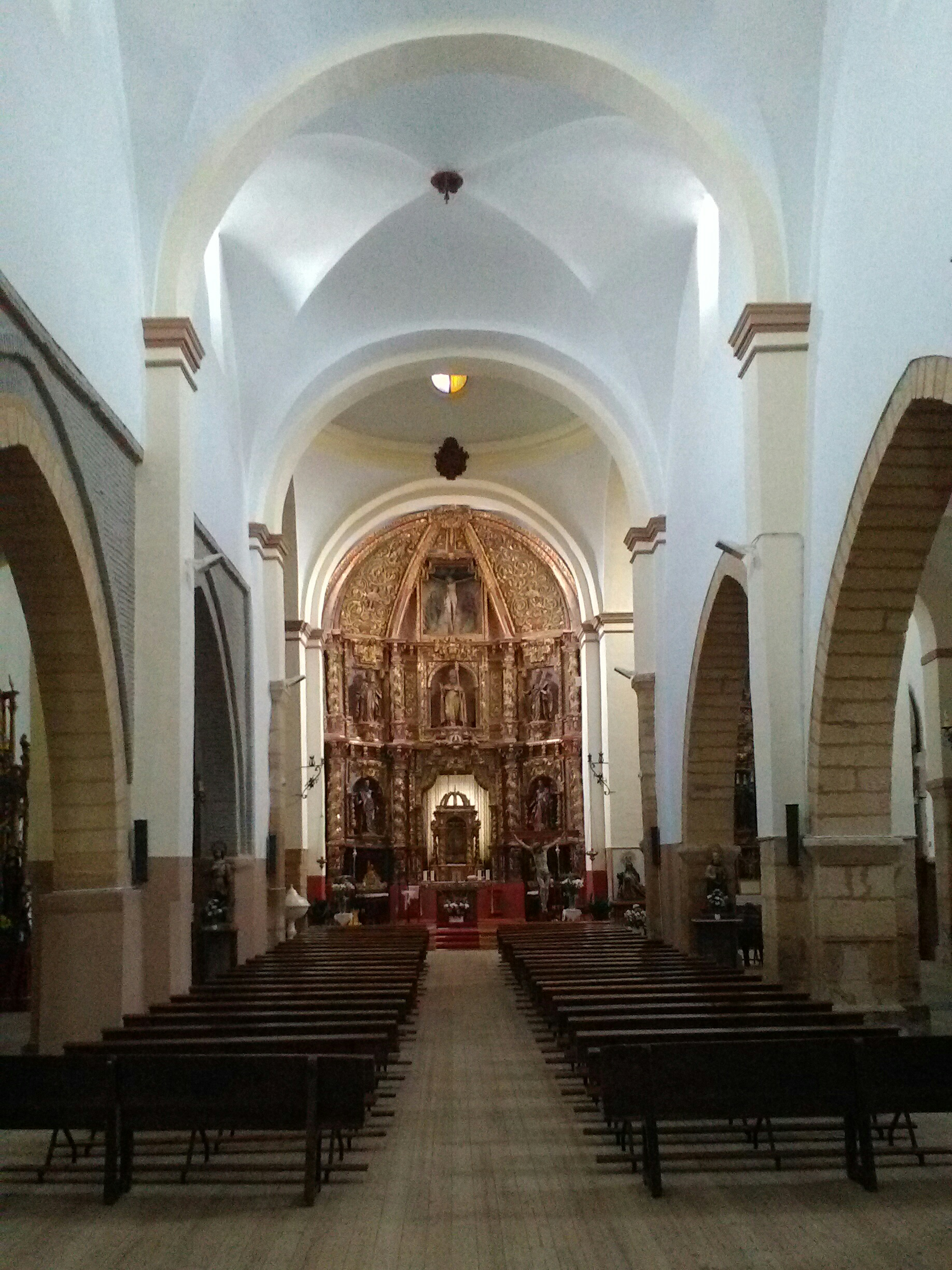 Interior de la Iglesia Parroquial de San Pedro Apóstol en Villademor de la Vega (León).